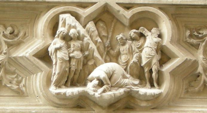 Orsanmichele tabernacolo dell'arte dei vaiai e pellicciai, rilievo di niccolò e piero lamberti con decollazione di san jacopo